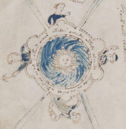 Détail du folio 86r2. Le château à six tours. En son centre le soleil, symbole de royauté baignant dans le bleu. Aux points cardinaux quatre personnes portant des attributs du pouvoir.